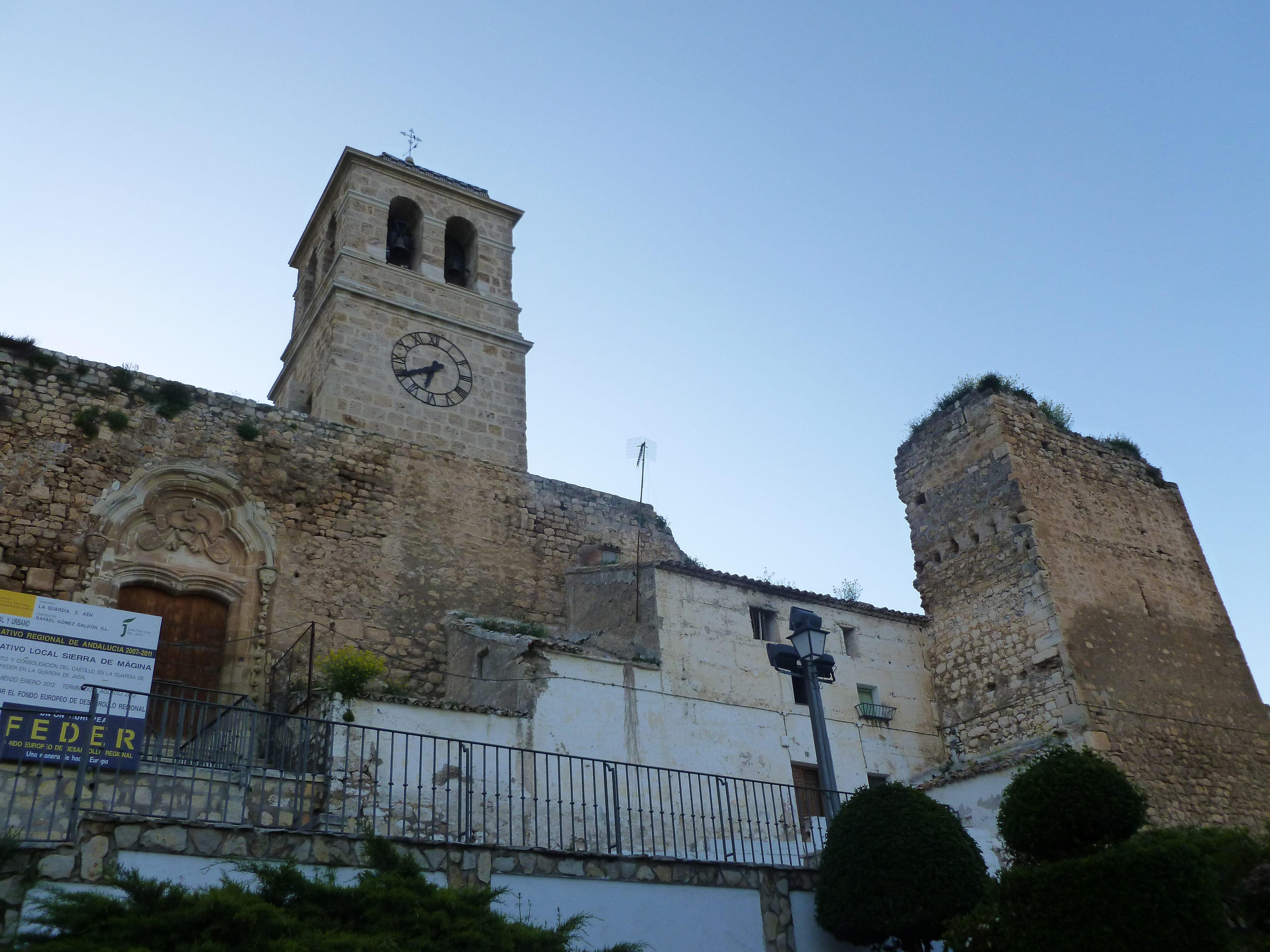 Castillo de La Guardia de Jaén